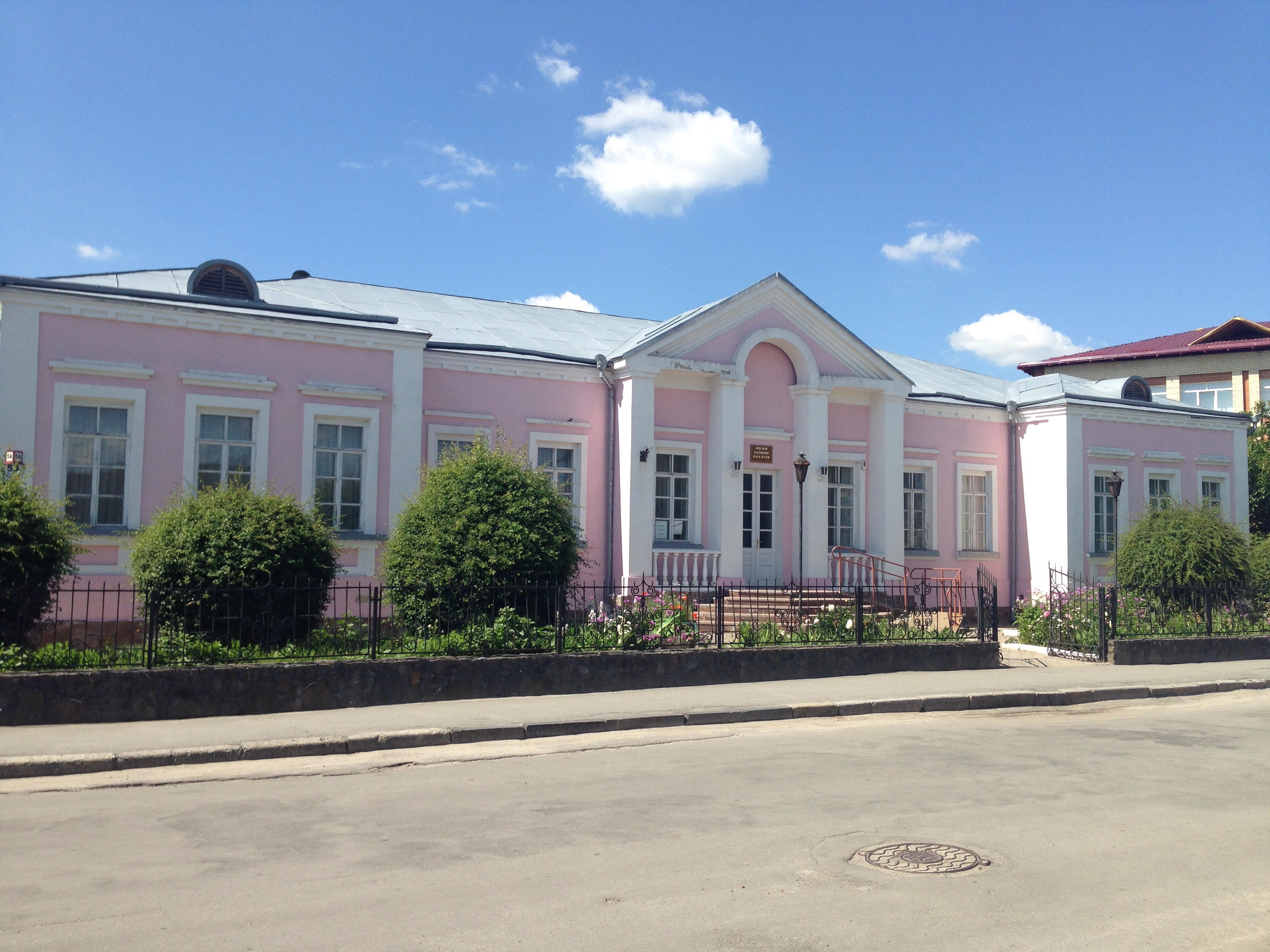 31 липня 1999 року відкриття музею родини Косачів.